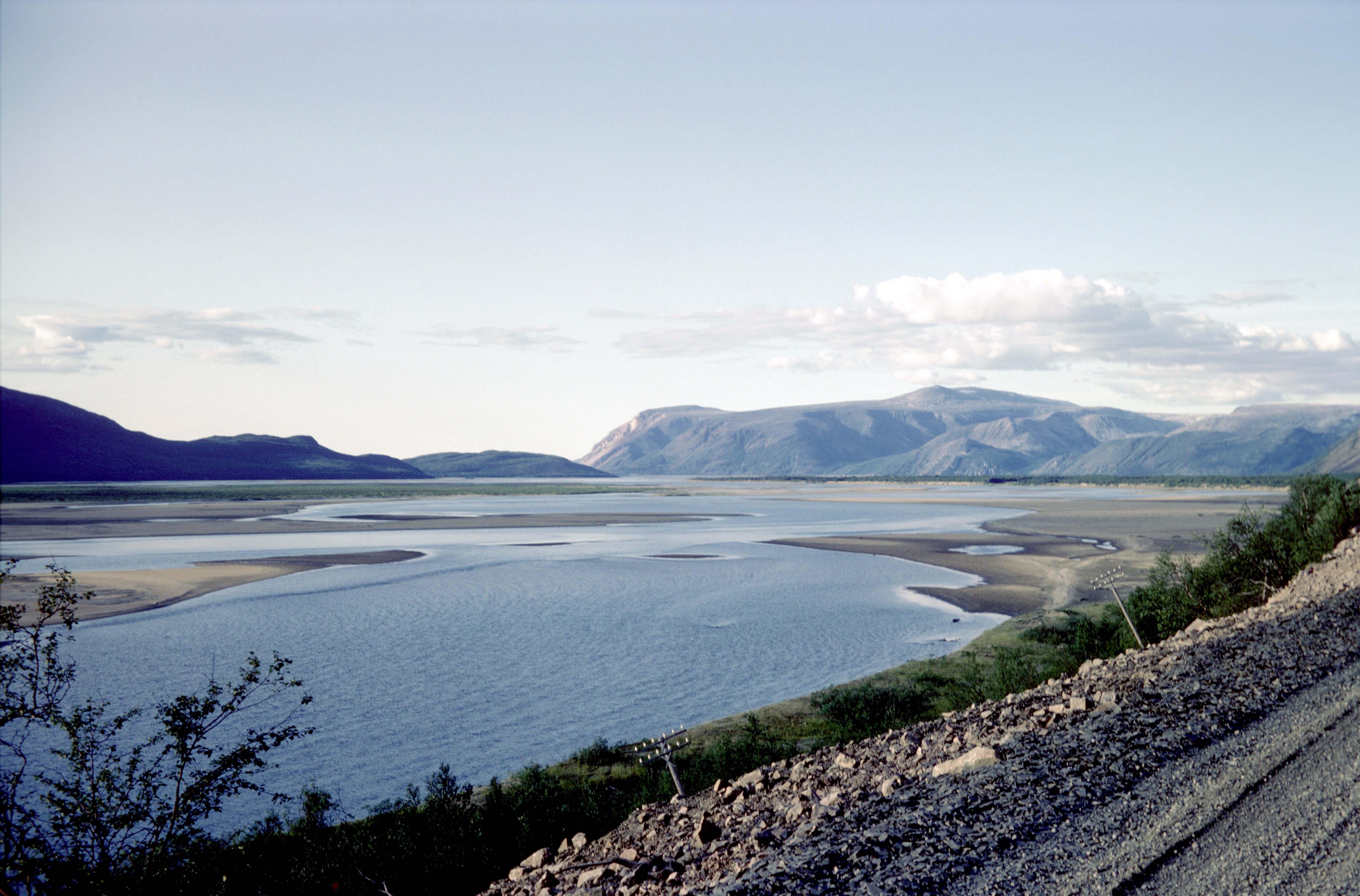 La rivière Tana (Tana elv) à quelques kilomètres de son embouchure dans le Tanafjorden. Photographie prise depuis la route 890. Fylkesveg 890, Tana kommune, Finnmark, Norvège.